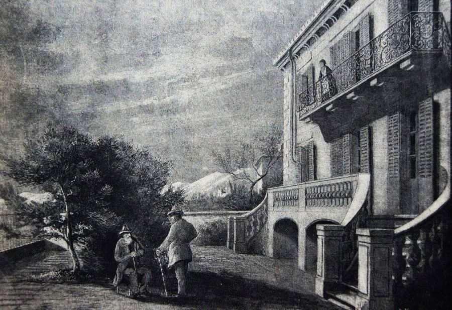 Na ilustracji widoczny jest Józef Ignacy Kraszewski, siedzący przy drzewku.